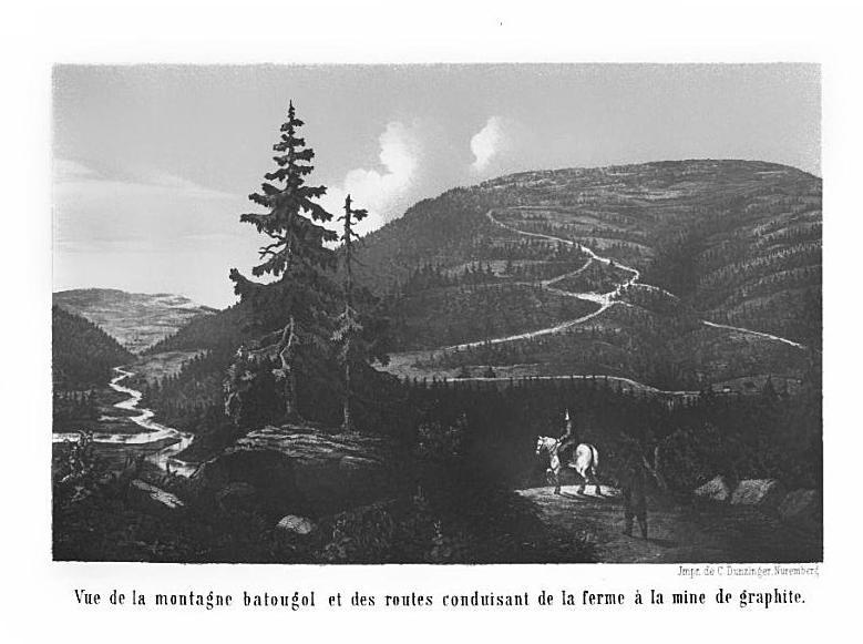 Montagne de Batougol et accès à la mine de graphite de Batougol (monts Saïan, Sibérie), découverte en 1847 et exploitée par Jean-Pierre Alibert. Planche tirée de La mine de graphite de Sibérie découverte en 1847 par M. J.-P. Alibert, Paris, Poitevin, 1865.